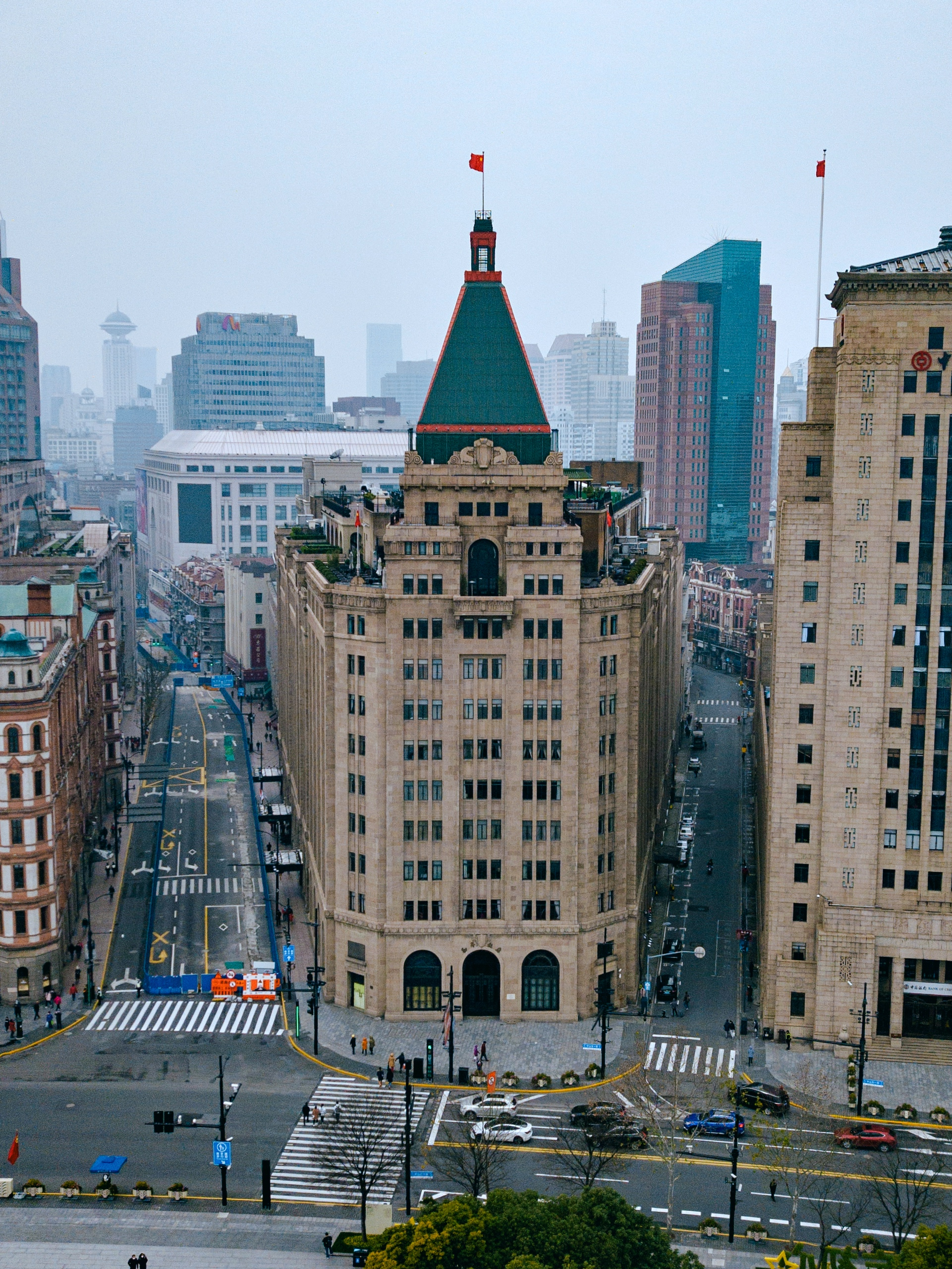 和平饭店正立面